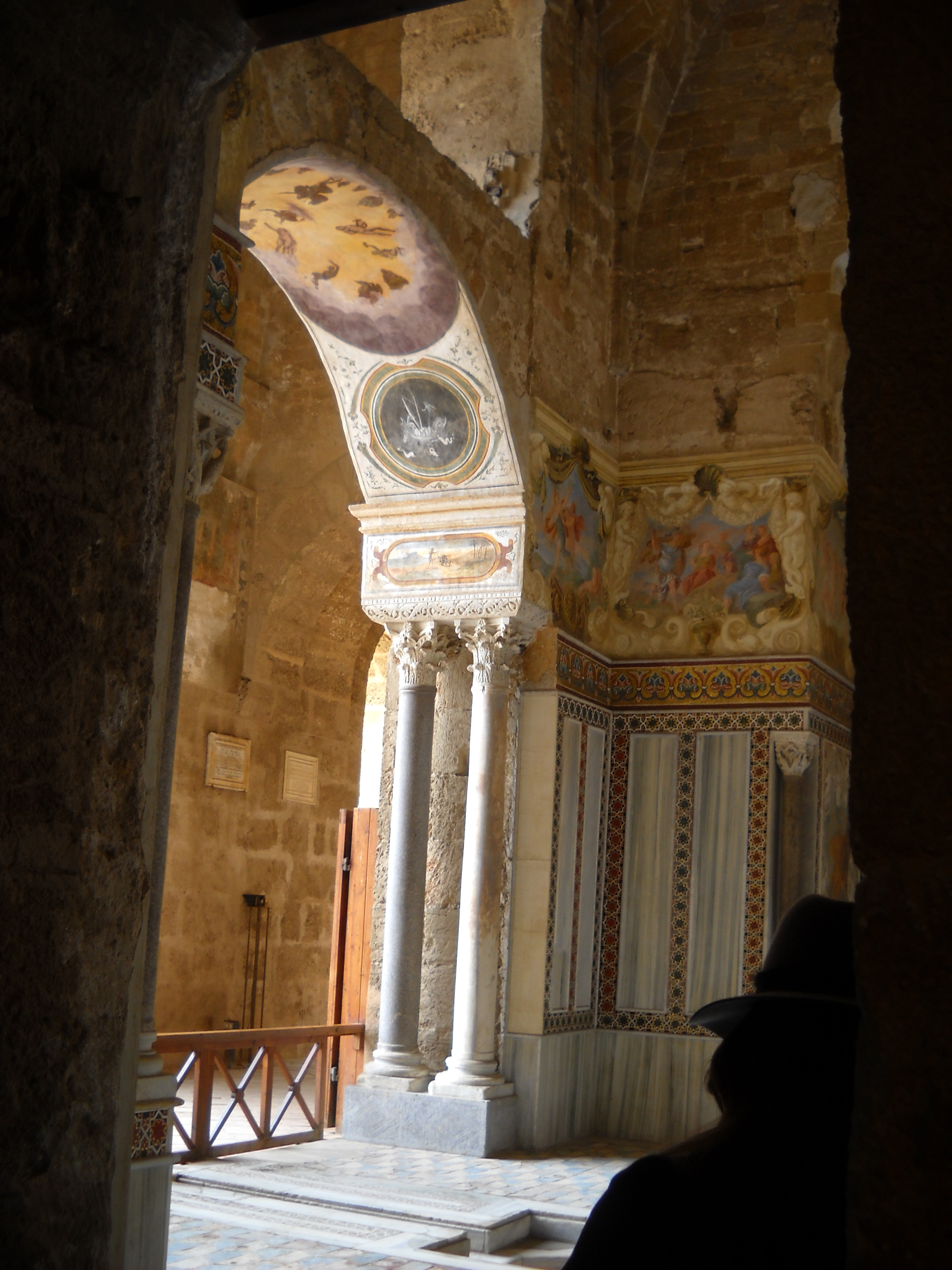 La Zisa: dettaglio arcata del portico